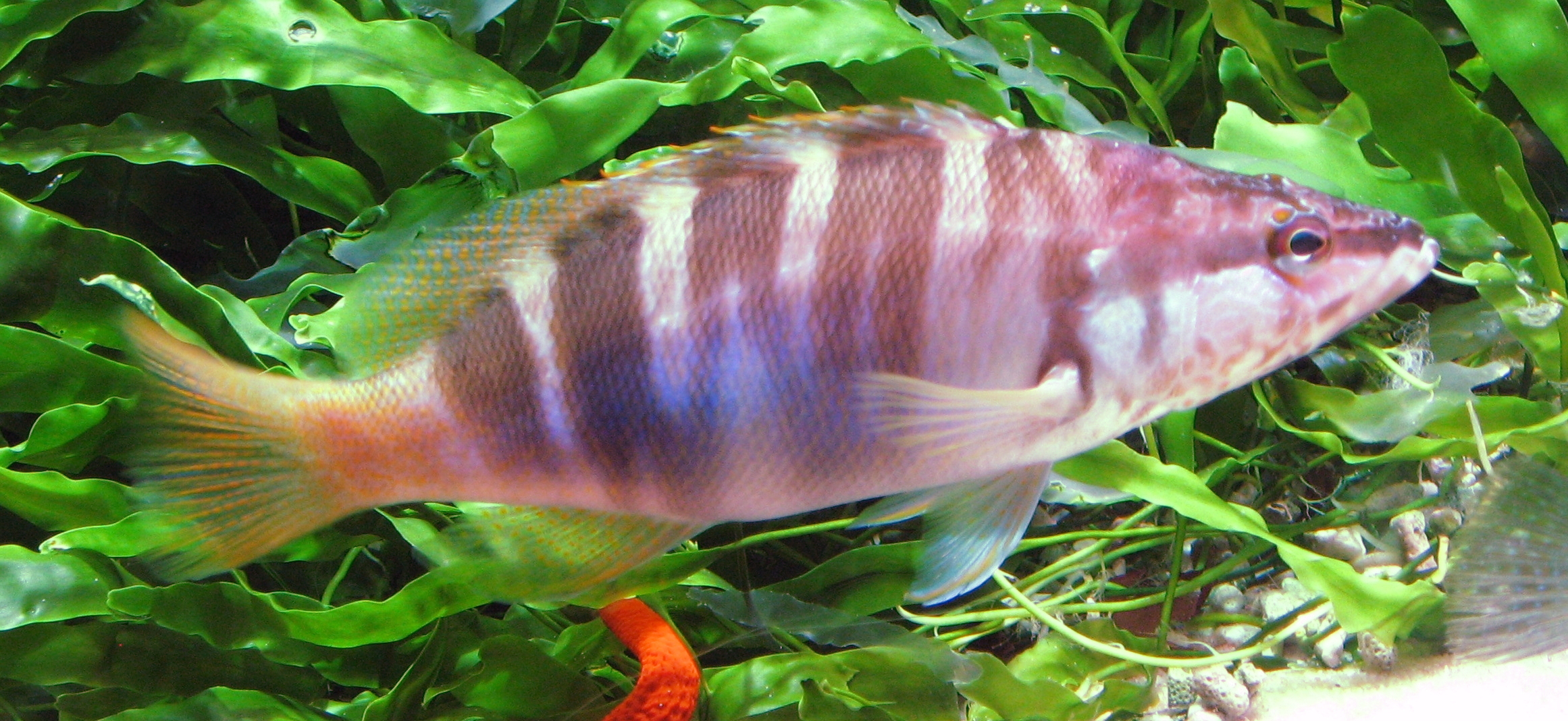 Serranus scriba in Aquarium Cinéaqua Map: 48° 51' 44" N 2° 17' 27" E